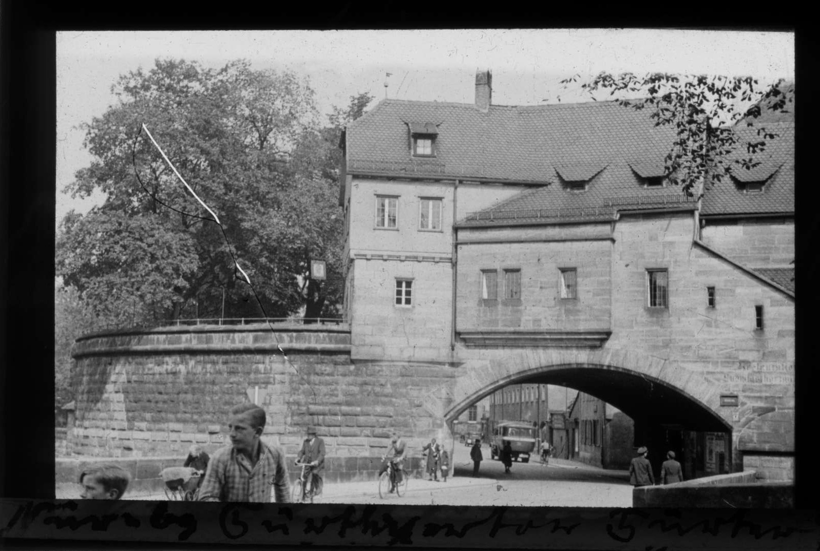 Nürnberg: Fürther Tor.